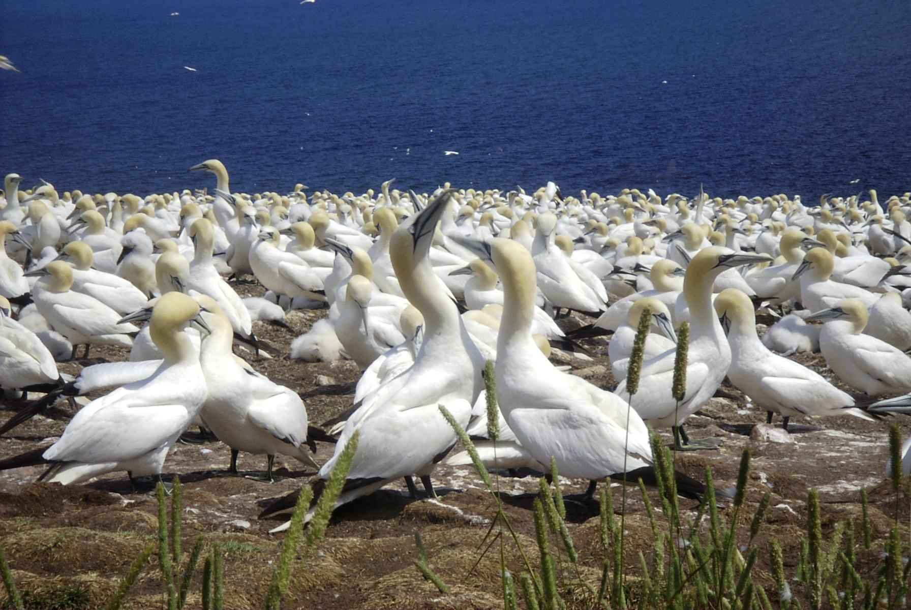 Basstölpel (Morus bassanus) auf der Insel Bonaventure, Percé, Kanada.